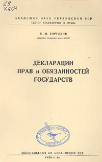 титульный лист книги В.М. Корецкого